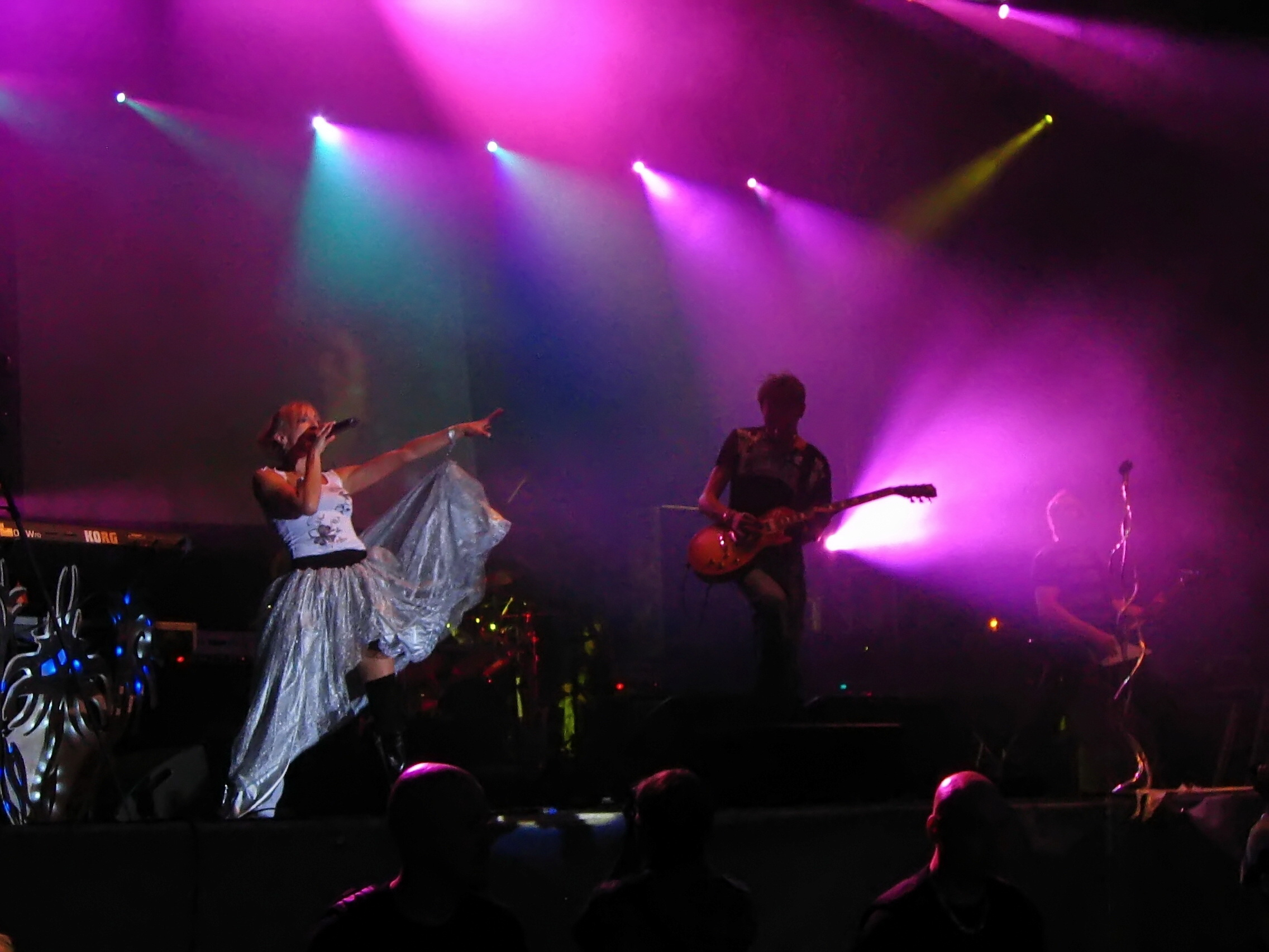 Koncert zespołu Łzy